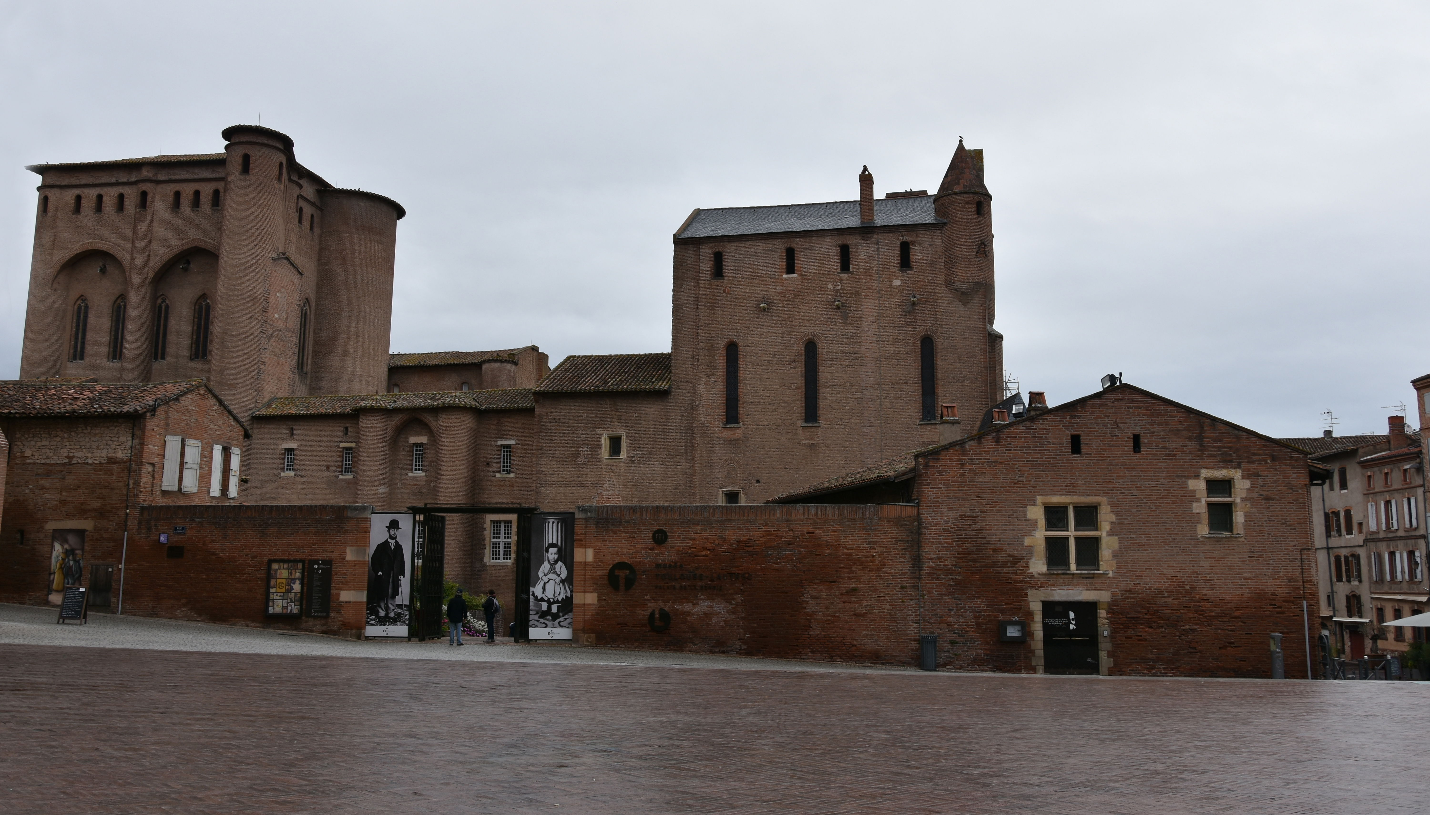 Musée Toulouse-Lautrec (palais de Berbie) Albi 9-10-2019 12-04-03